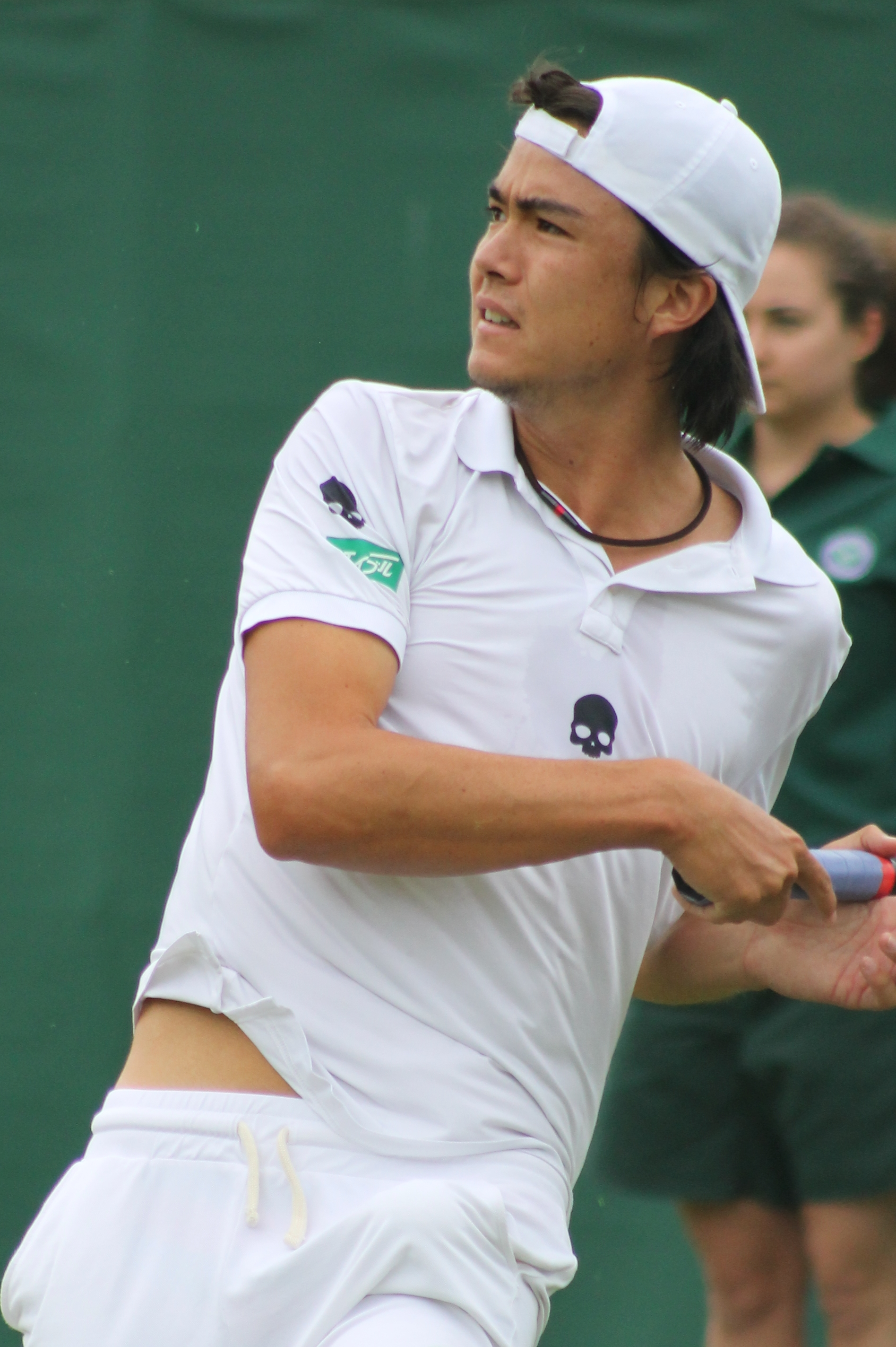 Daniel WMQ14 (7)